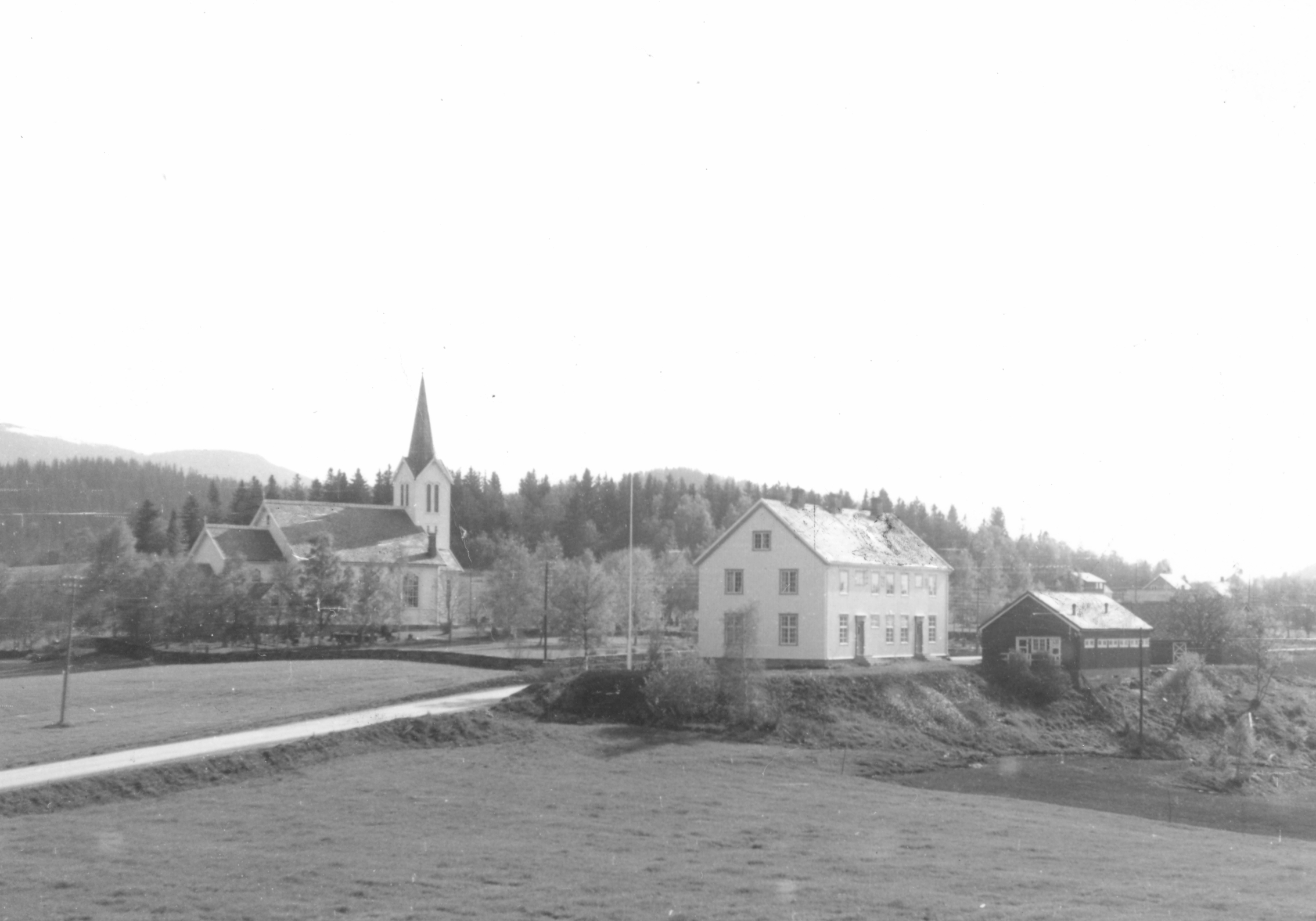 Åsen kirke og Heradshuset, sett fra Vedul vestre. Dåpssakristiet på østre ende av kirka (til venstre) stod ferdig i 1963. Fotograf / Photographer: Ukjent Fotoeier / Photo owner: Olaf Vedul Digitalisering / Digitizing: Arne Langås Foto-ID / Photo ID: 039-0009 Har du utfyllende opplysninger? Legg gjerne igjen en kommentar nedenfor eller send e-post til . | Do you have additional information? Please leave a comment or send an e-mail to .